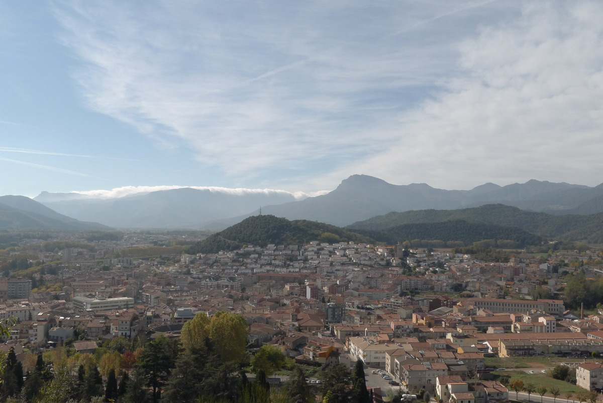 Olot